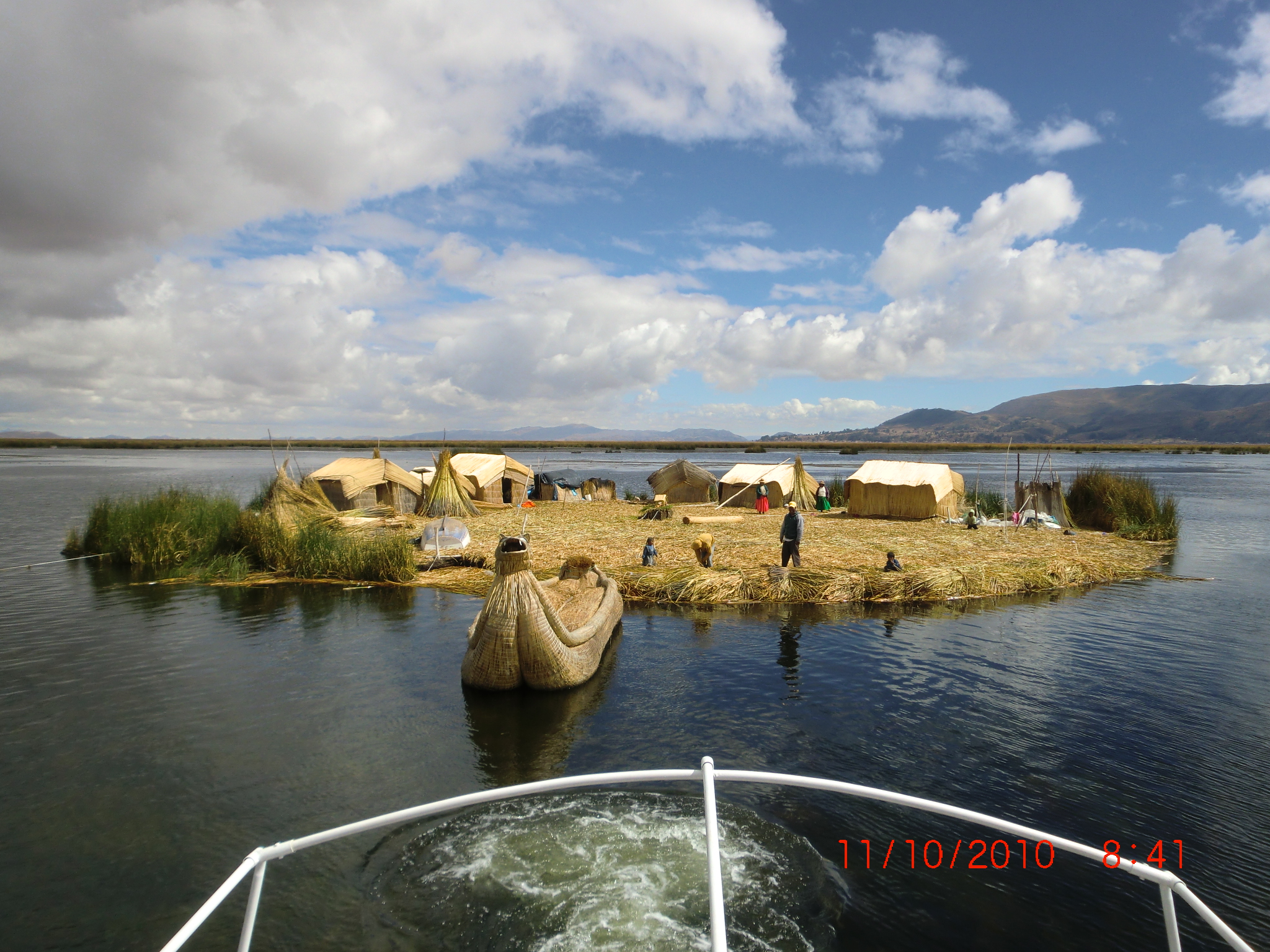 Isla flotante de los uros.